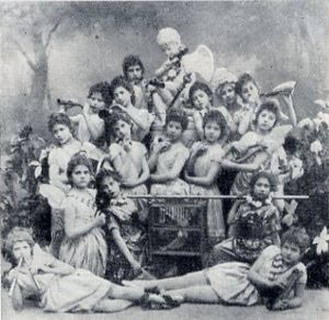 De foto is genomen door een onbekende fotograaf aan het Imperial Ballet School St.Petersburg, Rusland rond april 1891. De foto is afkomstig uit de eigen collectie van Mrlopez2681. De uploader neemt aan dat de per 9 augustus 2006 onder het publiek domein is omdat afbeelding meer dan 100 jaar oud is. Photo taken by an unknown photographer at the Imperial Ballet School, St. Petersburg, Russia circa April 1891. Photo comes from own collection and was scanned by me. Mrlopez2681 15:10, 9 August 2006 (UTC)